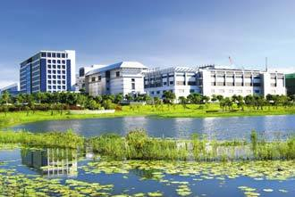 位在安南區的台南科技工業園區